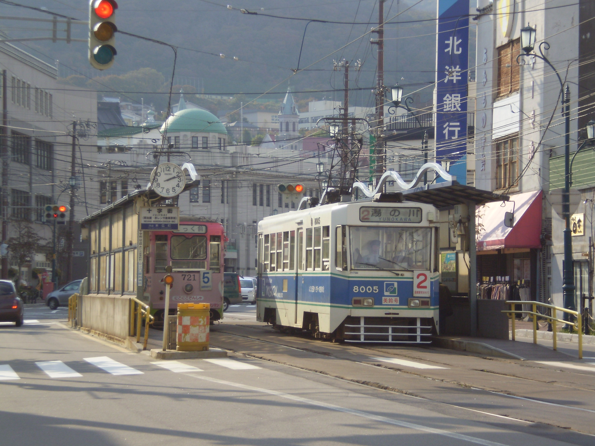 Hakodate city tram jujigai Stop（函館市交通局十字街停留所）